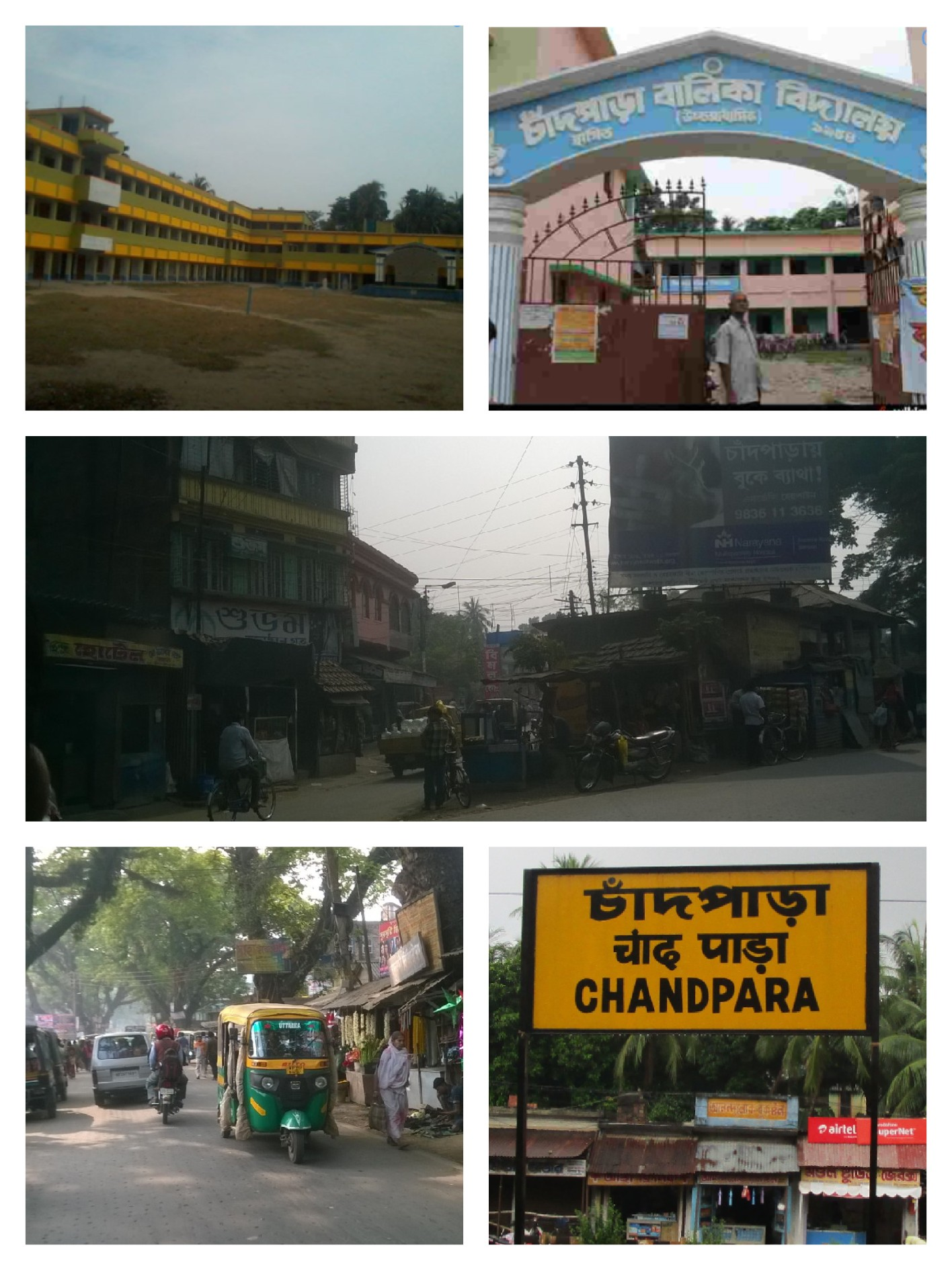 চাঁদপাড়া